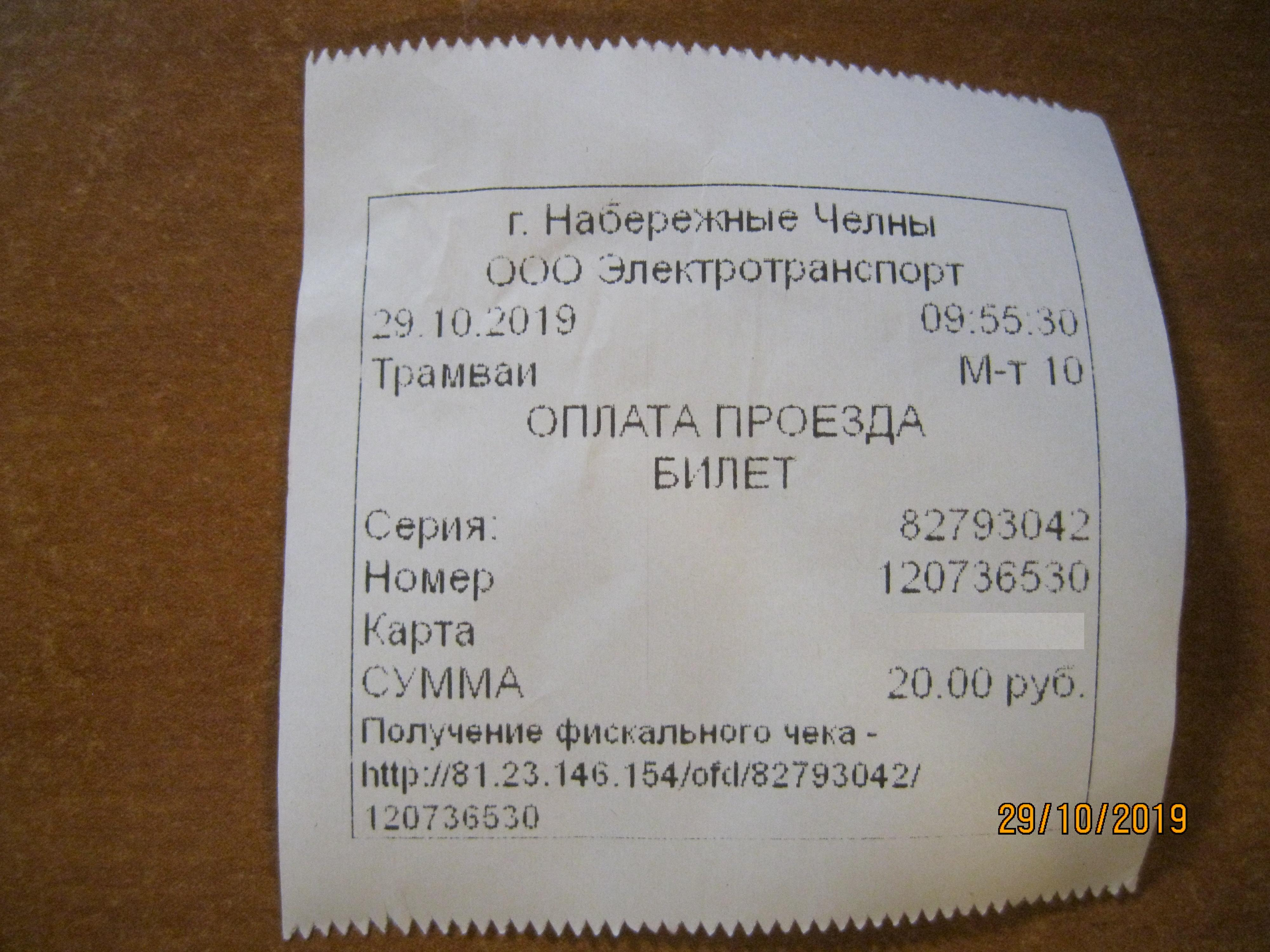 Кассовый чек оплаты за проезд трамваем.